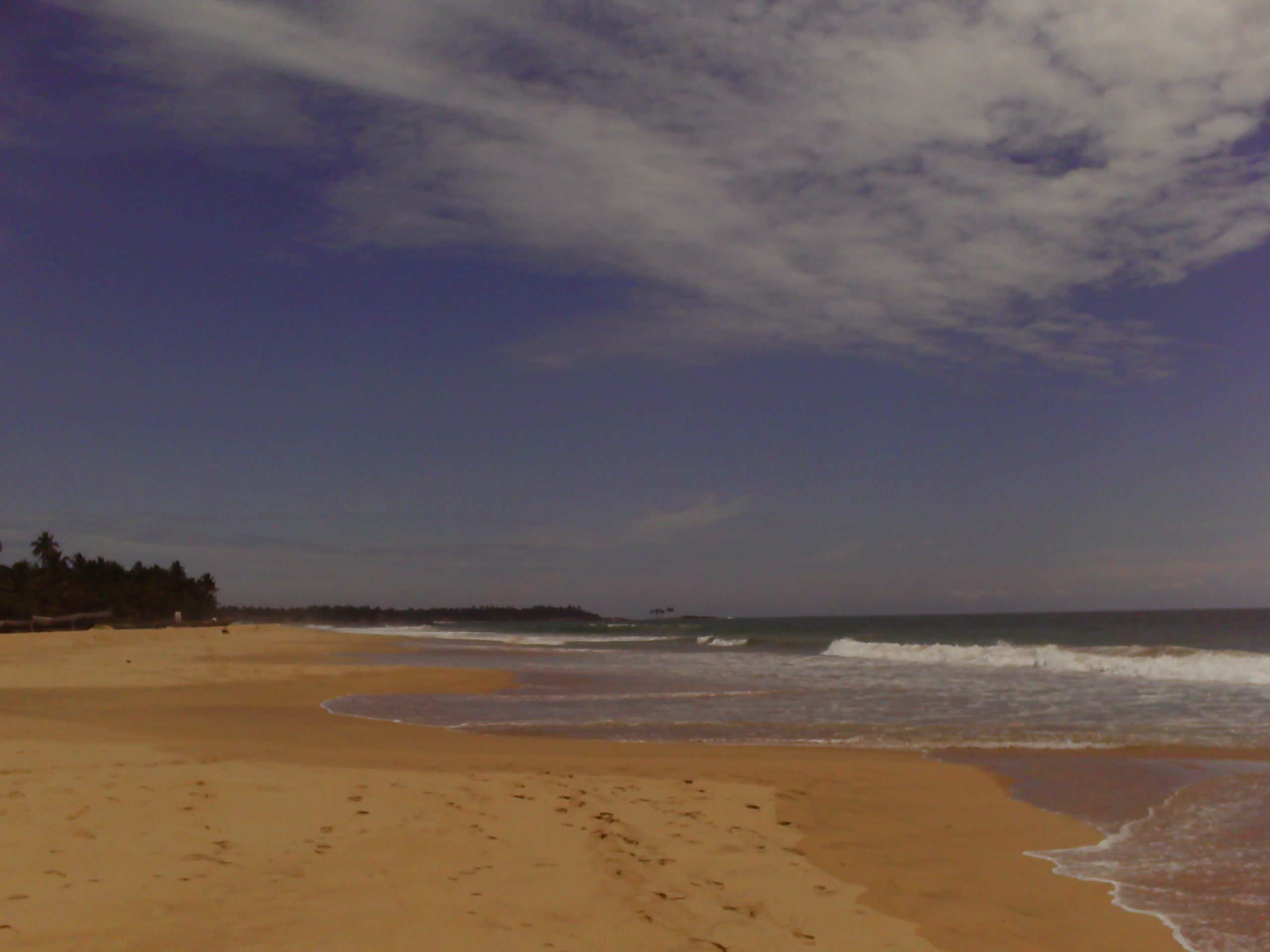 The beach at Hikkaduwa, Sri Lanka.